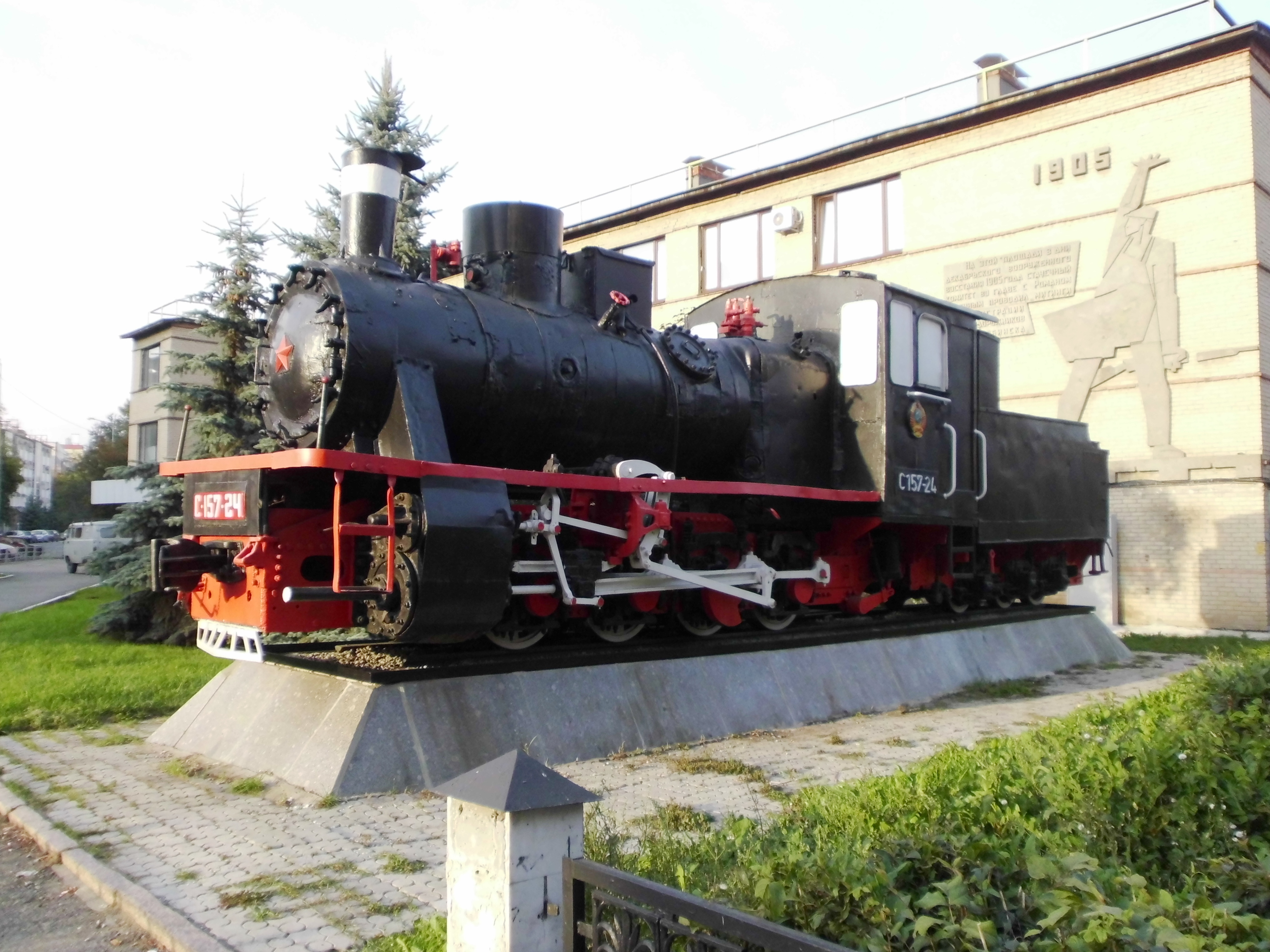 Место, где в 1905 г. проходили собрания и митинги рабочих и железнодорожников: улица Российская (на месте дома 295), Челябинск, Челябинская область. Памятник паровозу серии 157 у эксплуатационного локомотивного депо Челябинск.